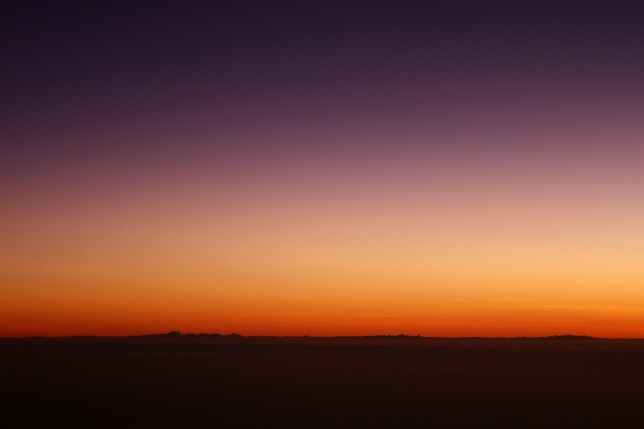 Sunrise